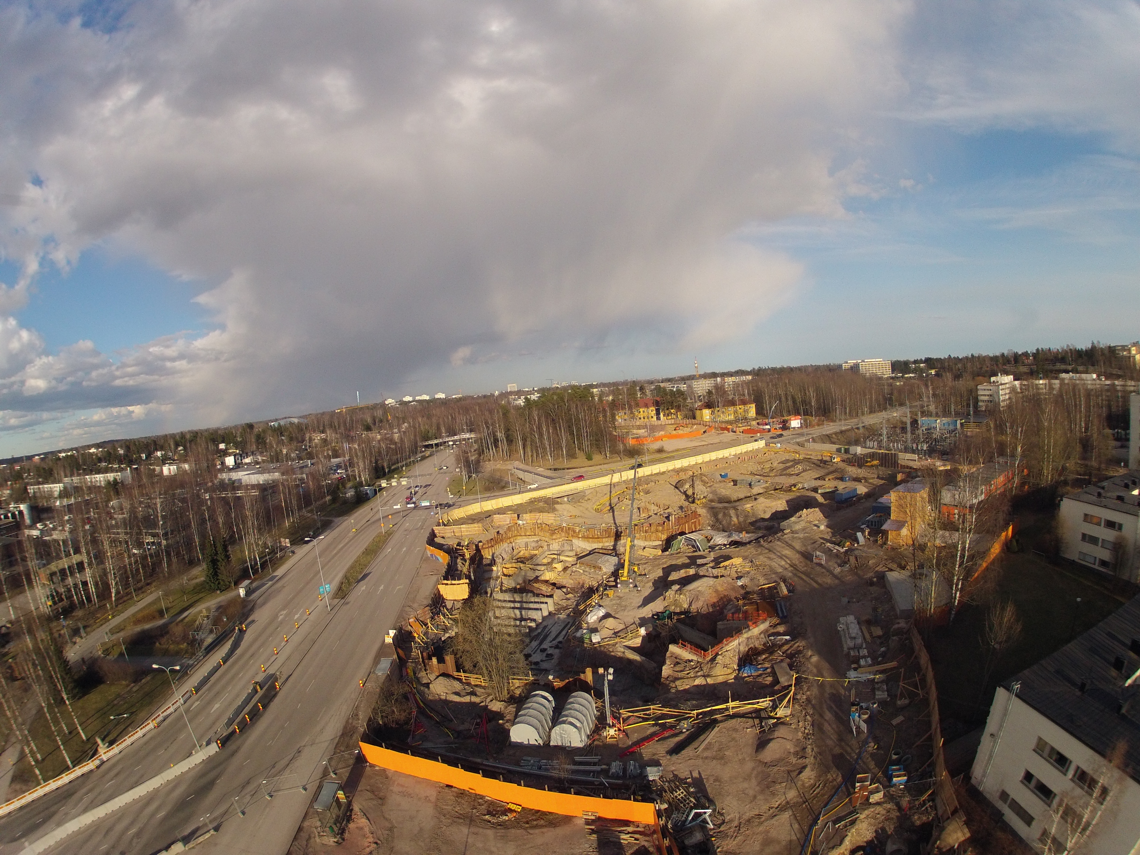 Länsimetron Niittykummun työmaan ilmakuva